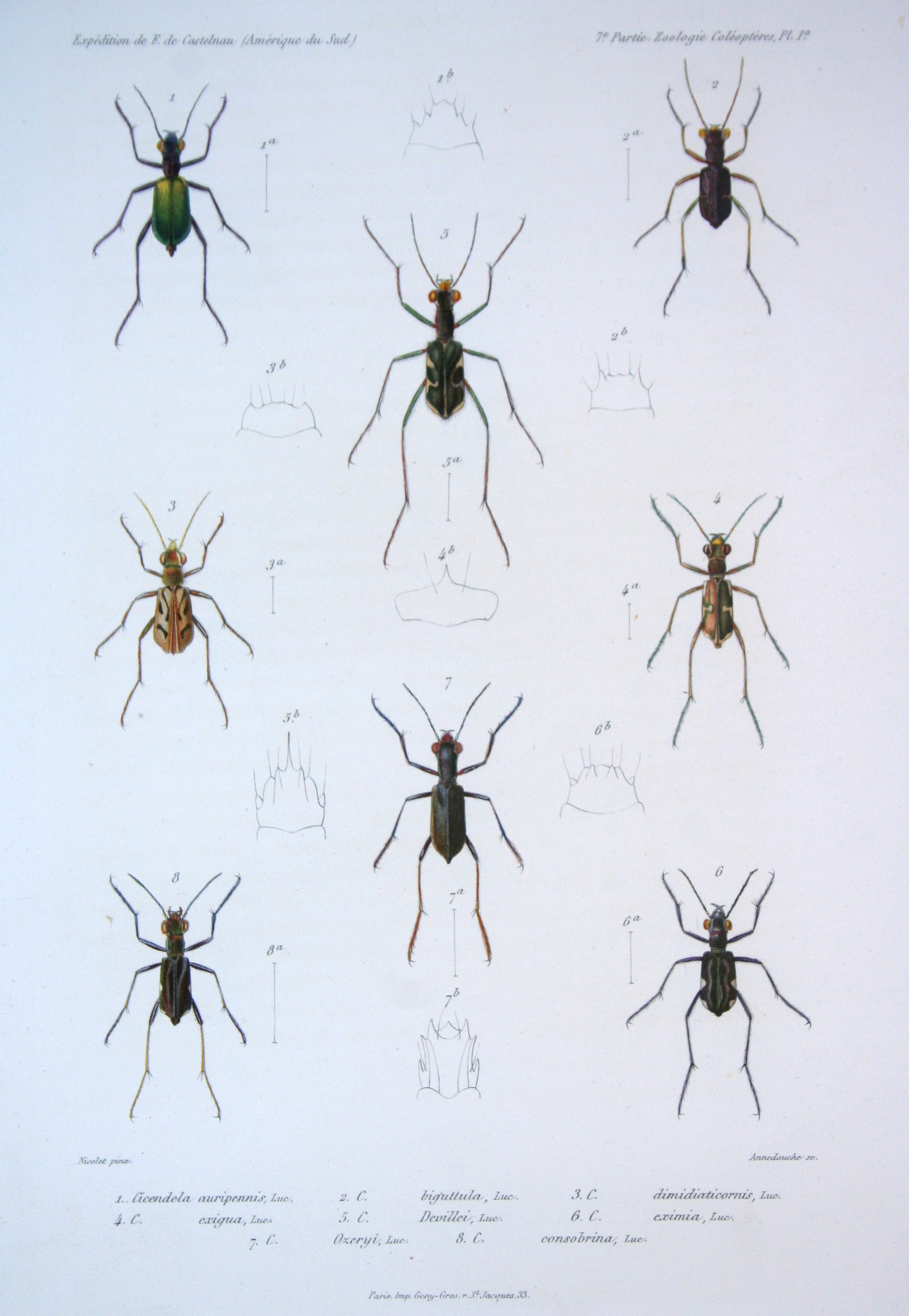 Cicendela auripennis Luc. = Cheilonycha auripennis Lucas, 1857 C[icendela] biguttula Luc. = Pentacomia distigma (Dejean, 1825) C[icendela] dimidiaticornis Luc. = Cylindera kollari (Gistl, 1837) C[icendela] exigua Luc. = Pentacomia cribata (Brullé, 1837) C[icendela] Devillei Luc. = Pentacomia egregia (Chaudoir, 1835) C[icendela] eximia Luc. = Odontocheila eximia Lucas, 1857 C[icendela] Ozeryi Luc. = Odontocheila cayennensis oseryi Lucas,1857 C[icendela] consobrina Luc. = Cenothyla consobrina (Lucas, 1857)